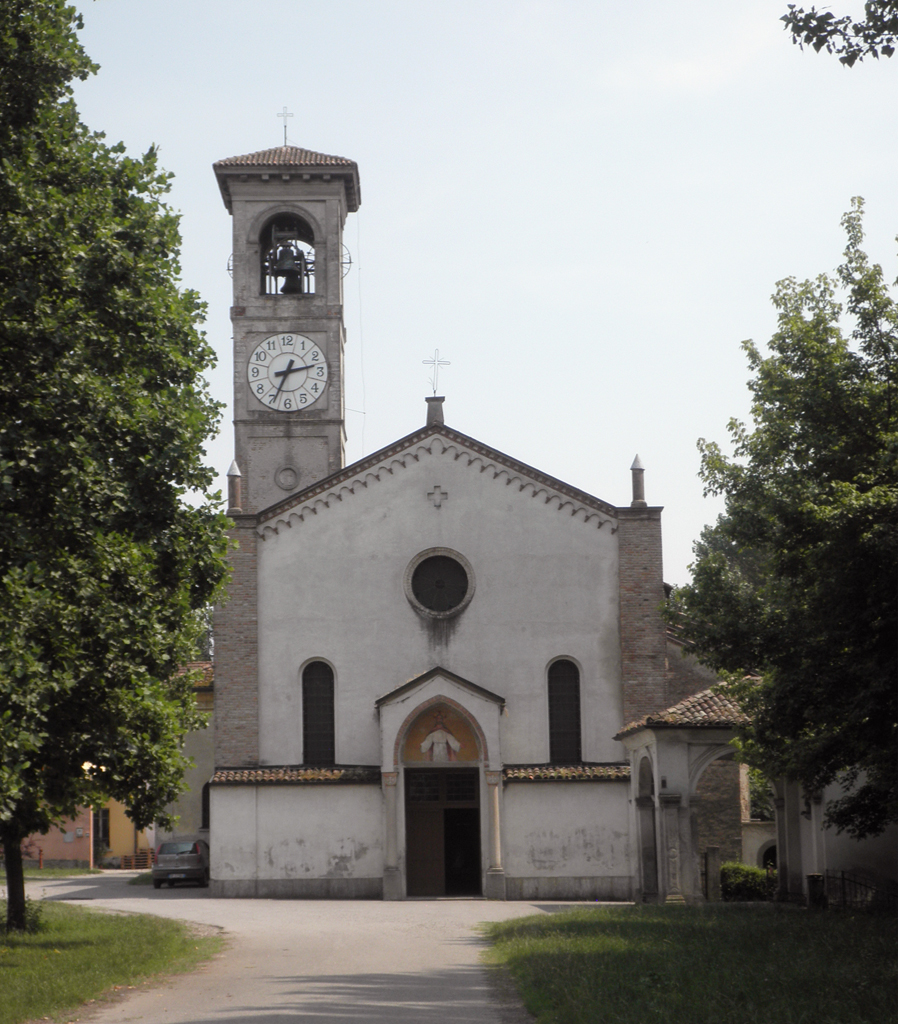 Il santuario della Beata Vergine Addolorata a Fontana, fraz. di Lodi